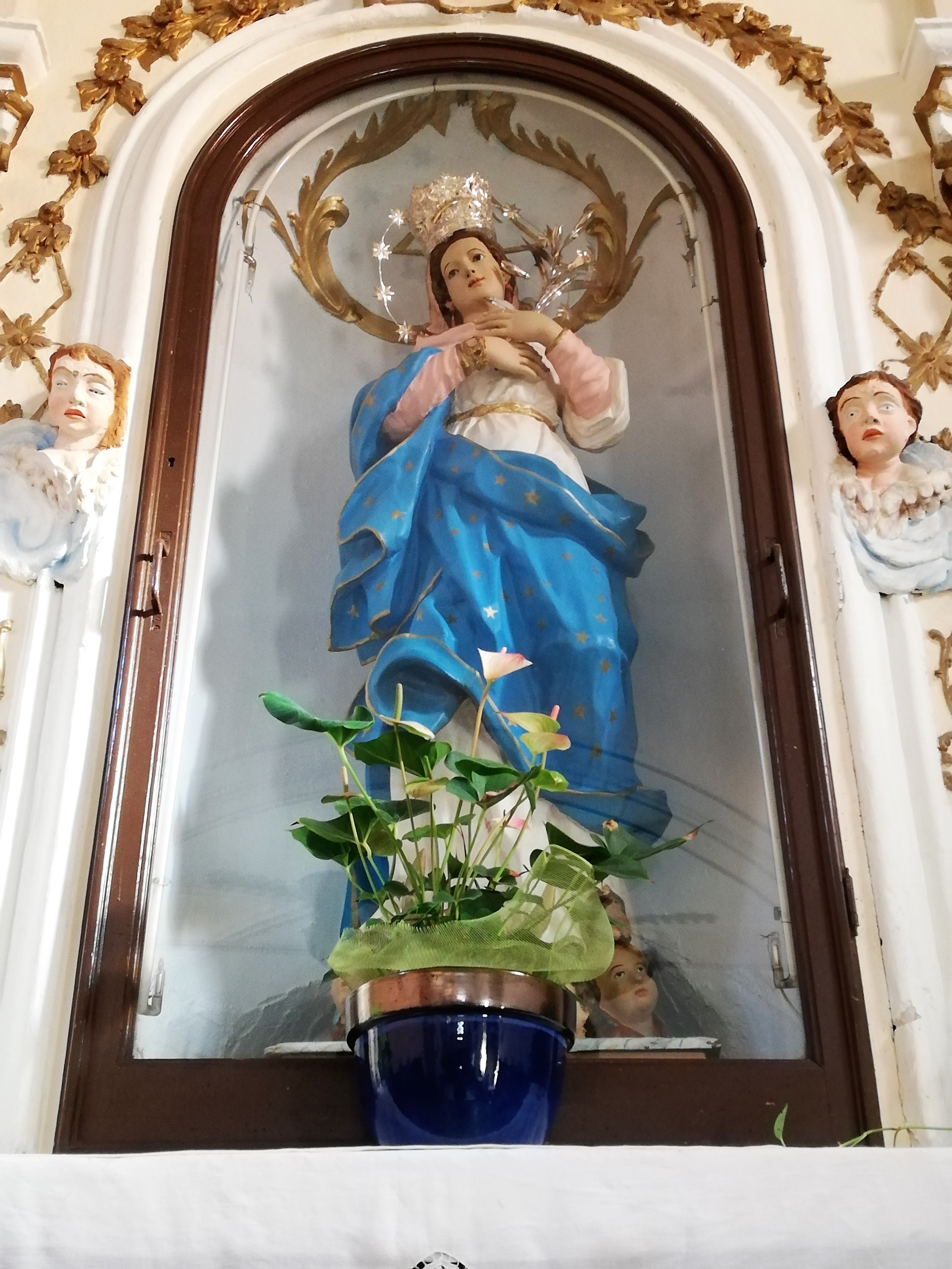 Statua Immacolata Concezione.